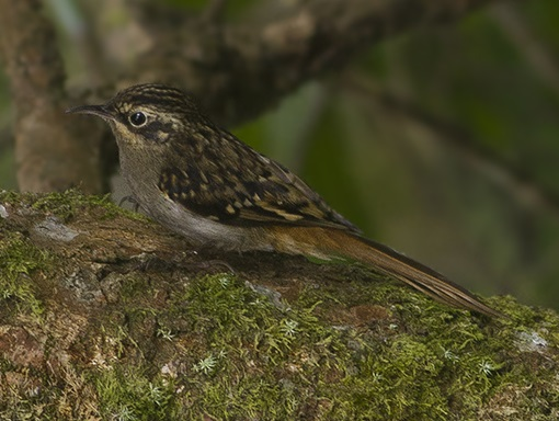 Certhia discolor, Blyth, 1845